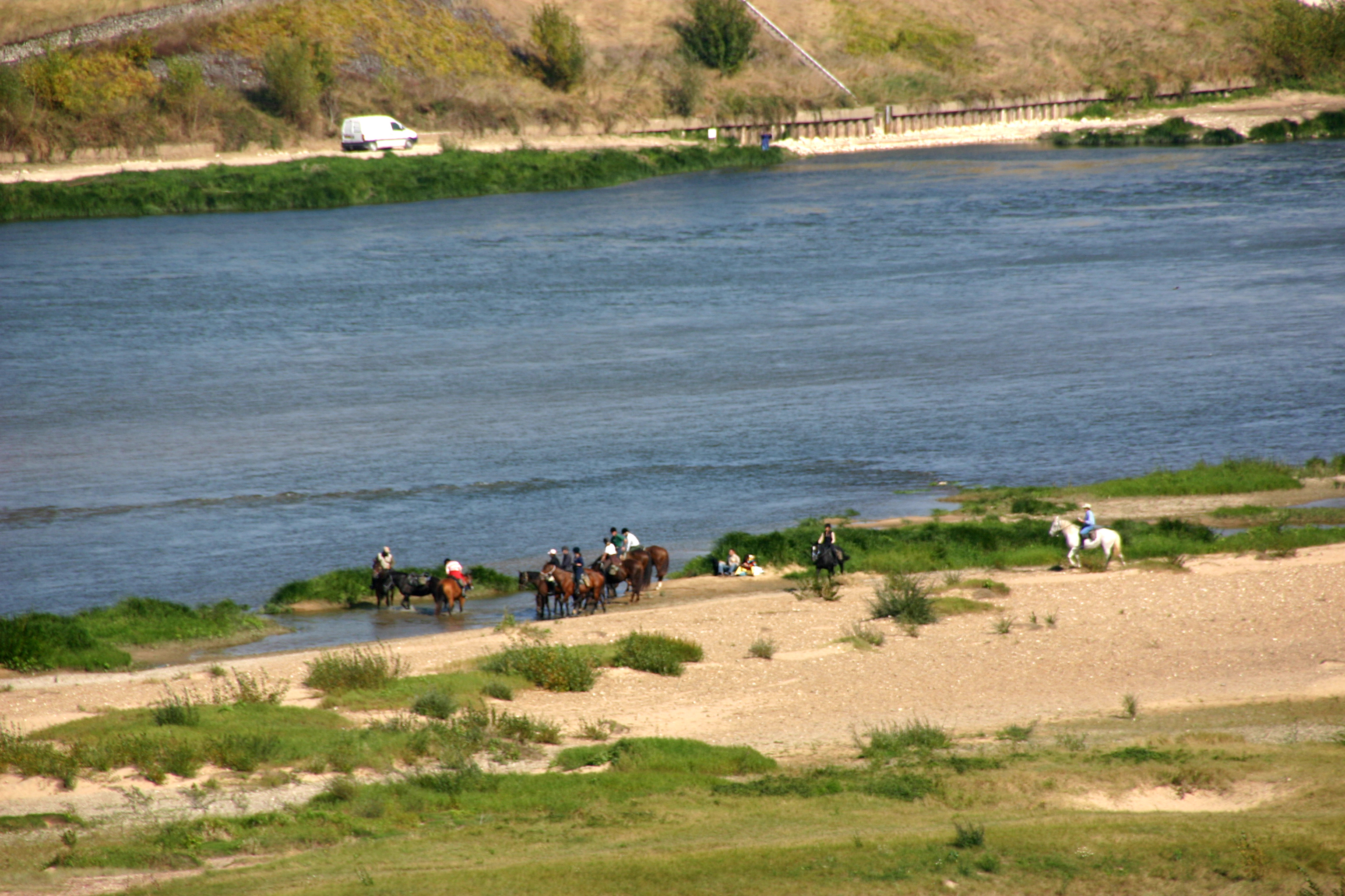 Loire bei Chaumont